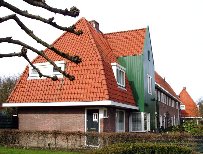 Huizenblok uit 1927 van architect J. Boterenbrood op hoek Purmerweg-Middeliestraat in Amsterdam-Noord